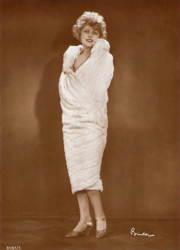 Ксения Десни